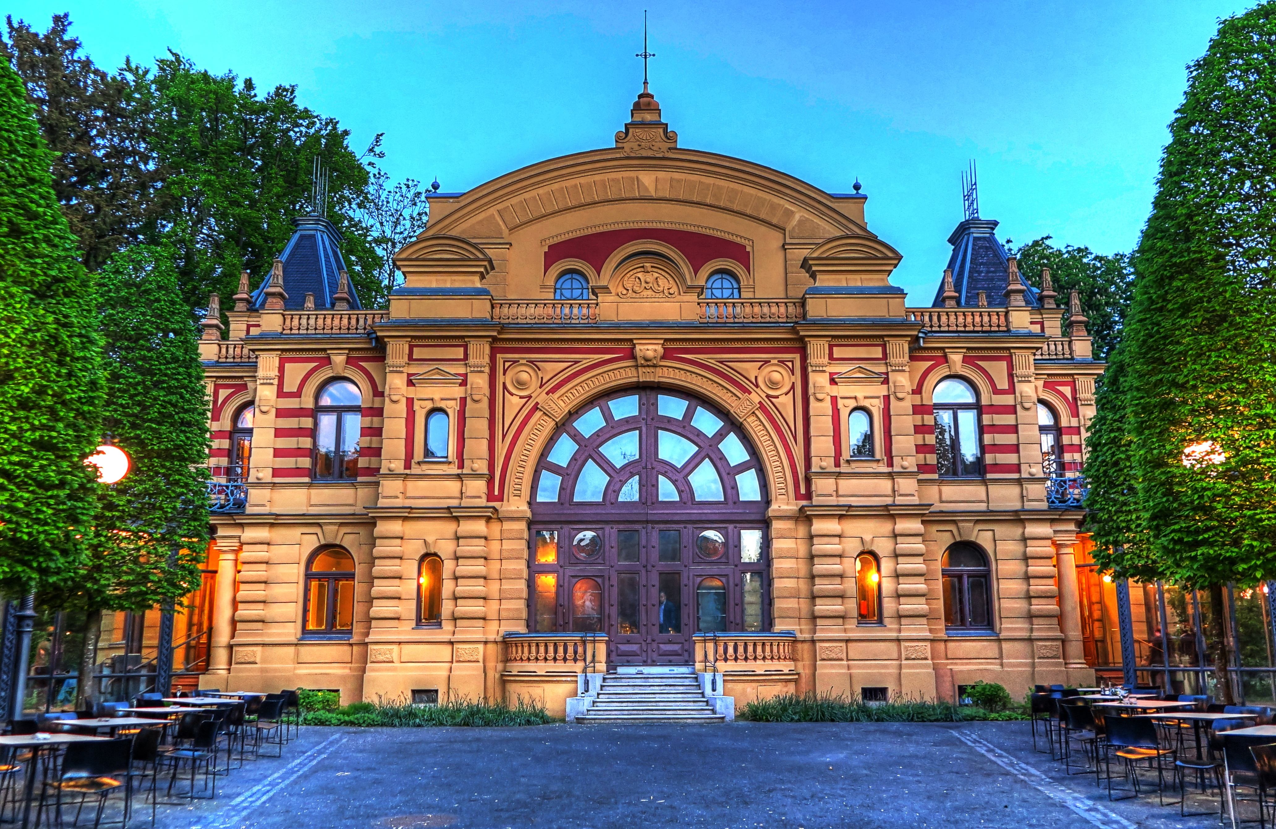 Deutschland, Bayern, Regierungsbezirk Schwaben, Augsburg, Parktheater Göggingen, Innenhof (HDR-Aufnahme)